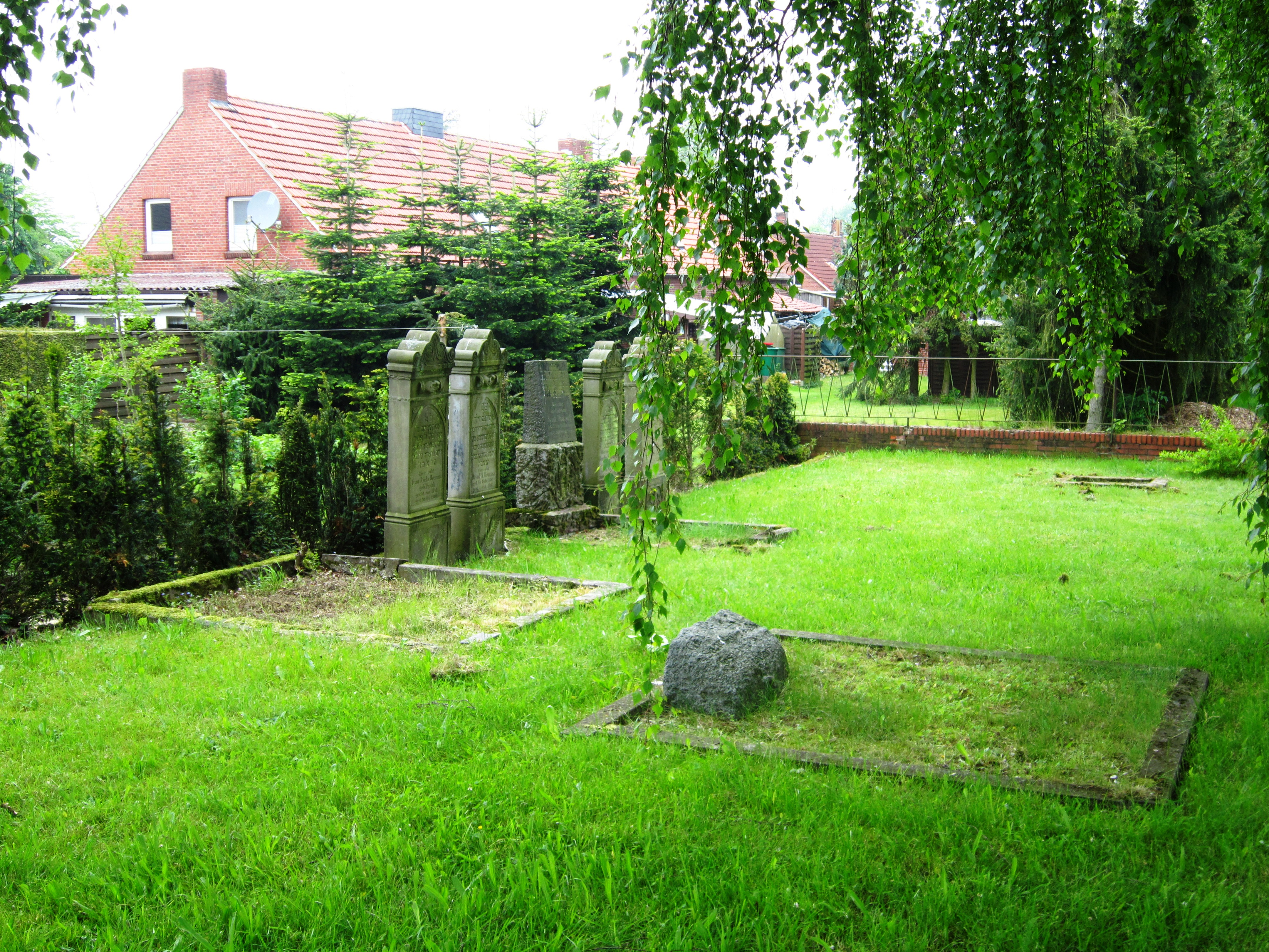 Joodskerhof aan de Buchenweg